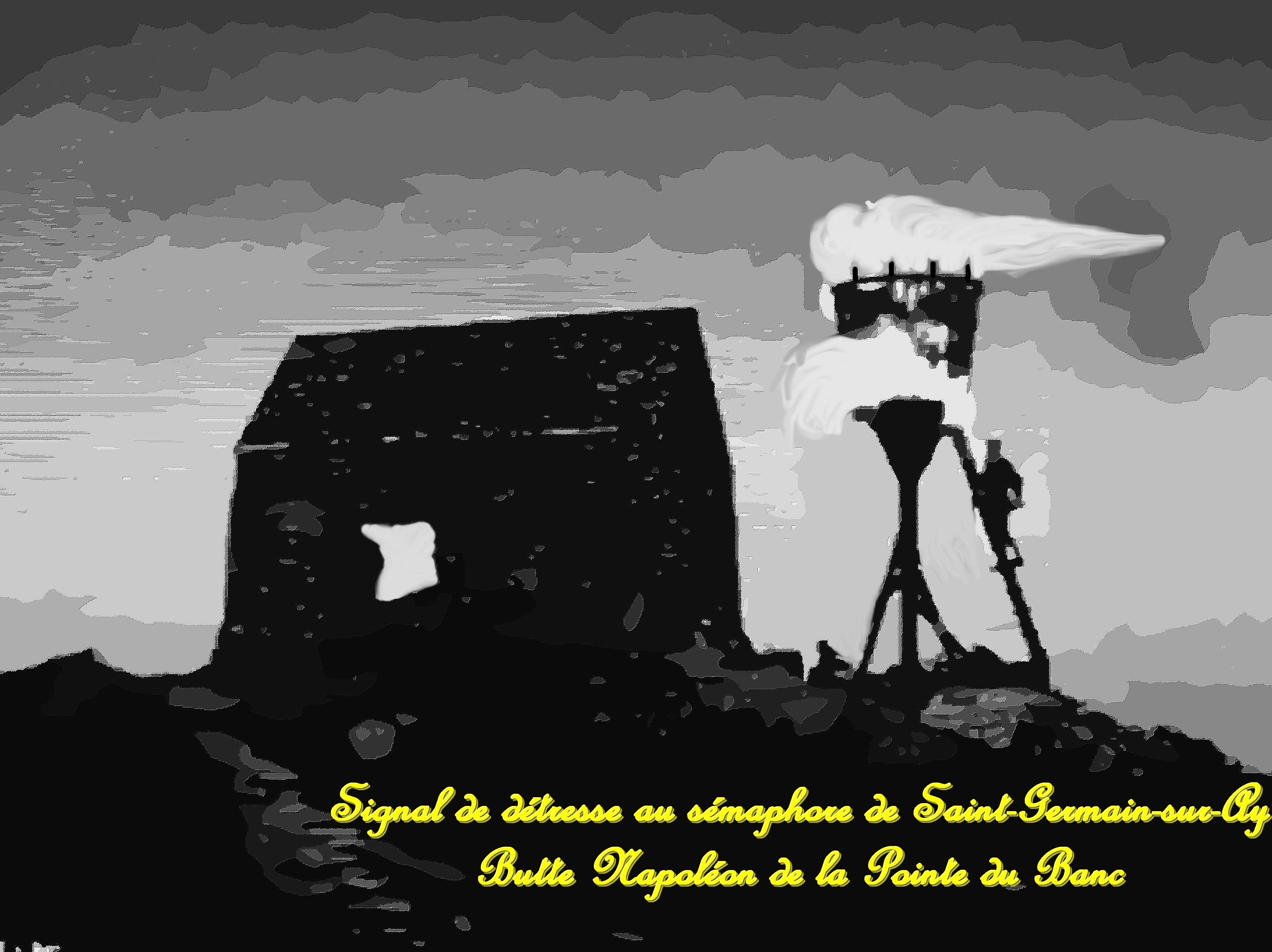 Cabane de guetteur XVII, XVIII et XIXe siècle